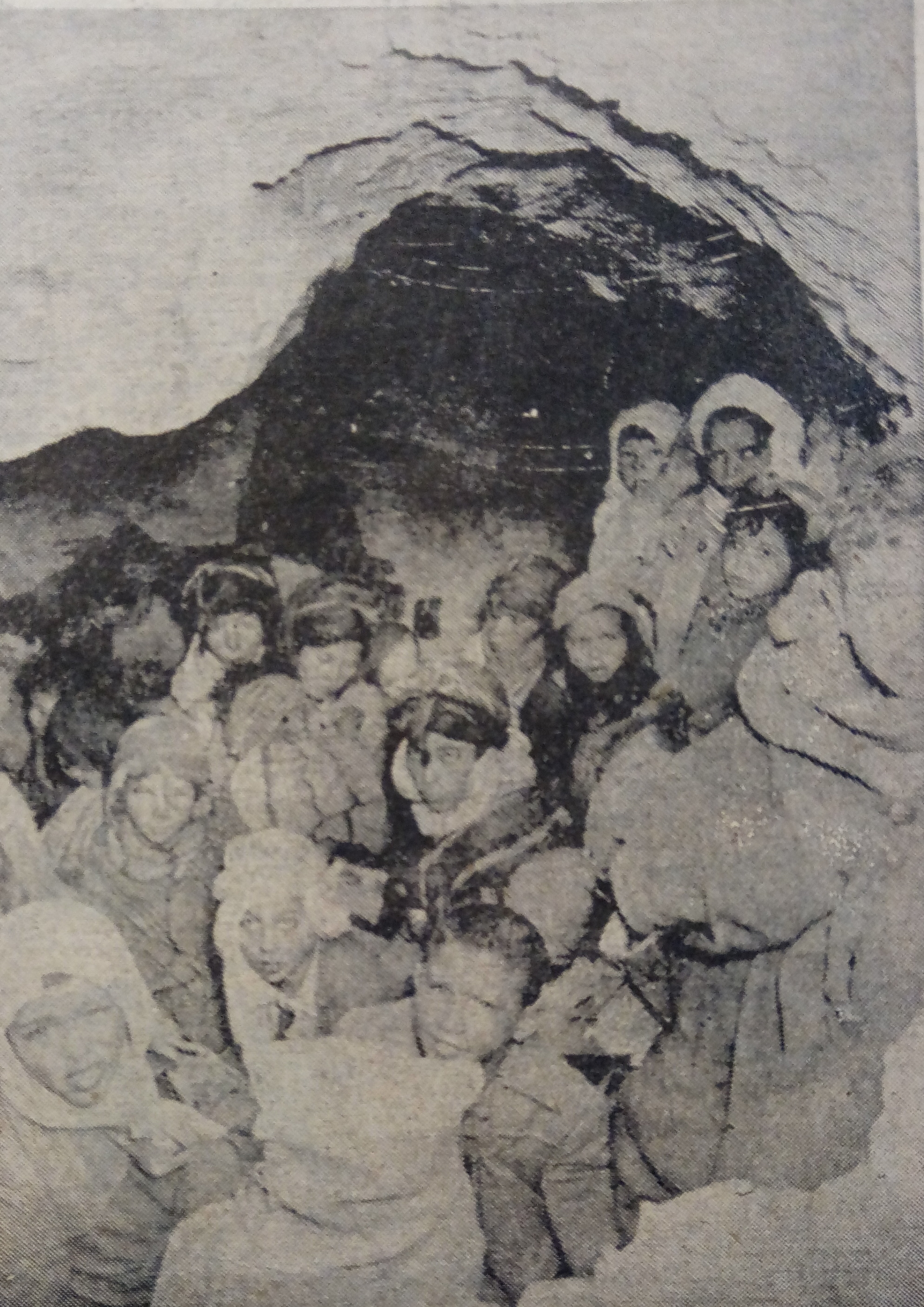 Réfugiés algeriens dans des grottes 1958